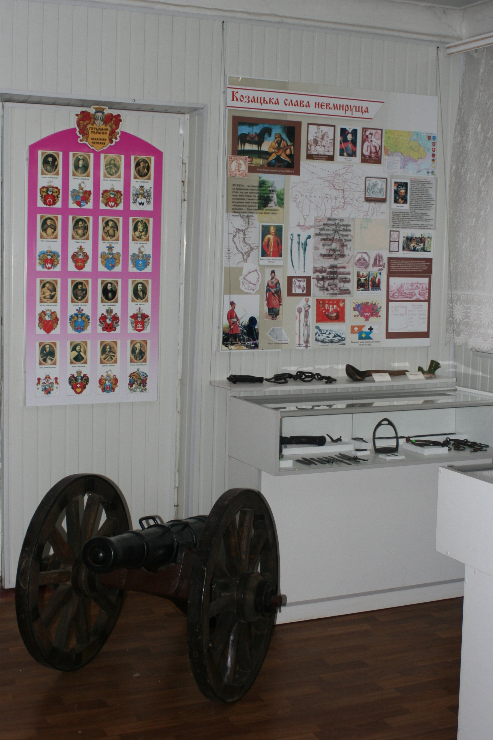 Фрагмент експозиції Новоархангельського районного краєзнавчого музею, присвячений козацькій добі.